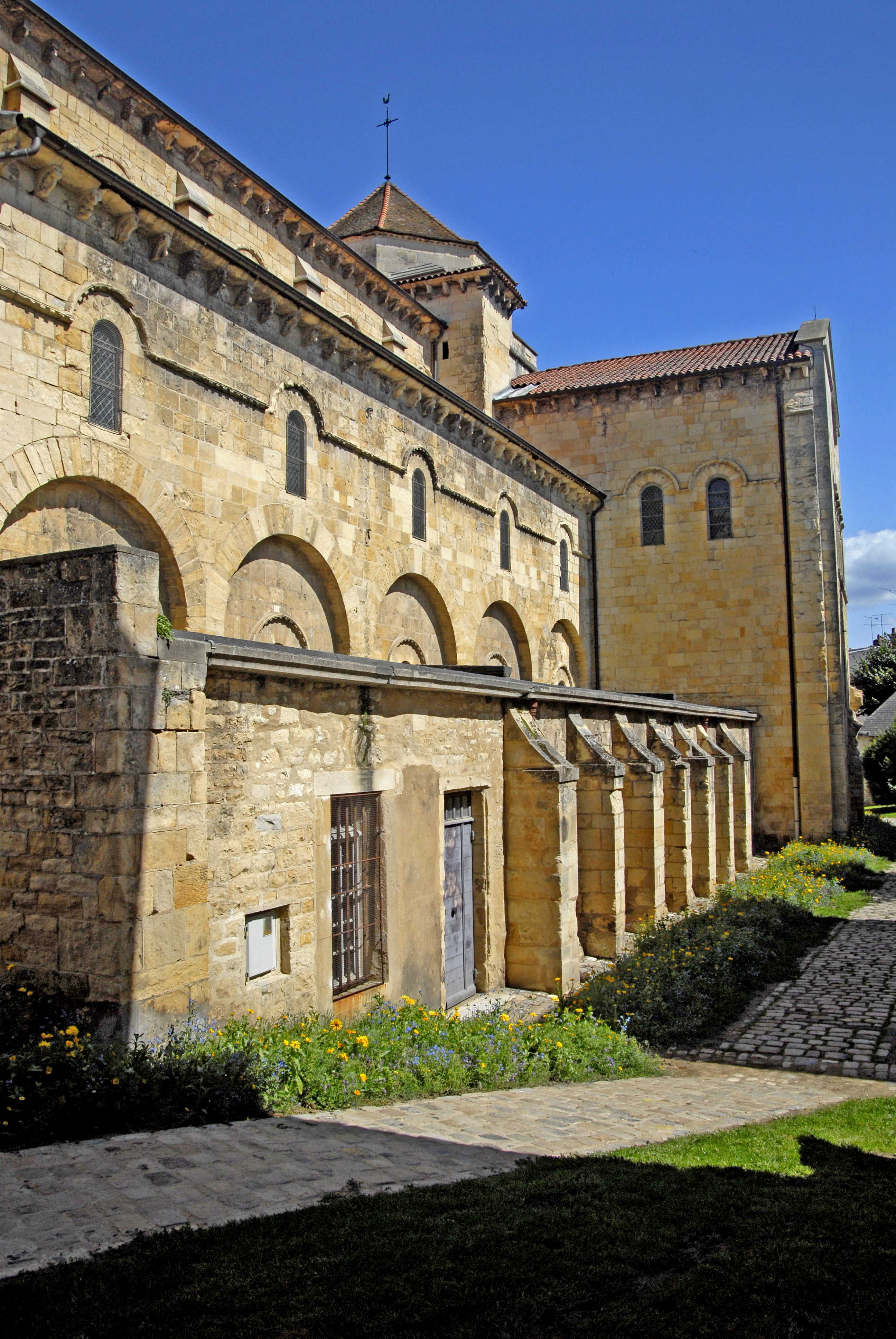 Saint-Etienne Nevers, südliche Langhausseite